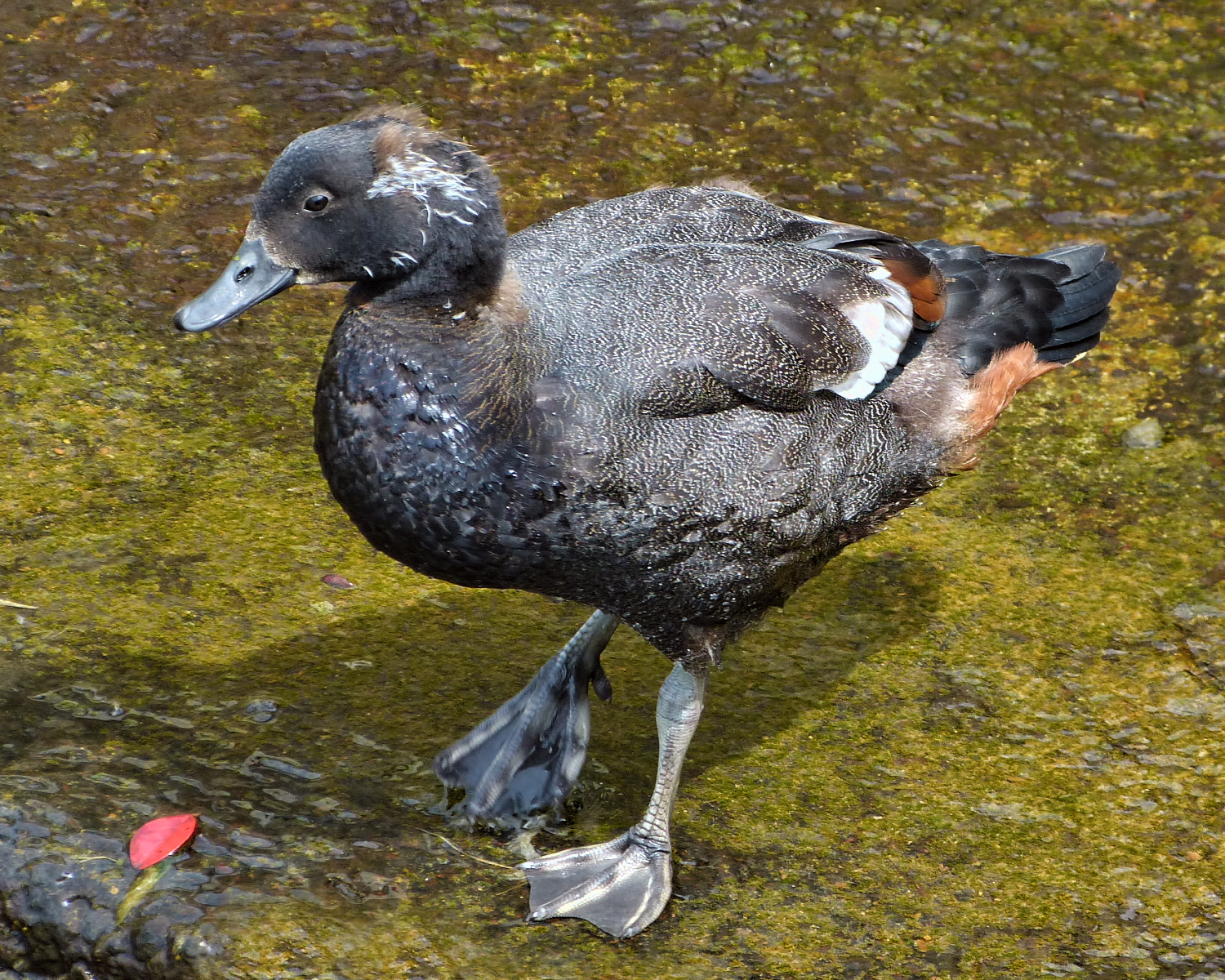 Juvenile Paradise Shelduck